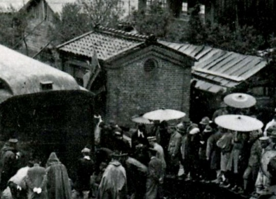 東海道線石山駅にあったランプ小屋。脱線事故の写真の一部を拡大したもの。